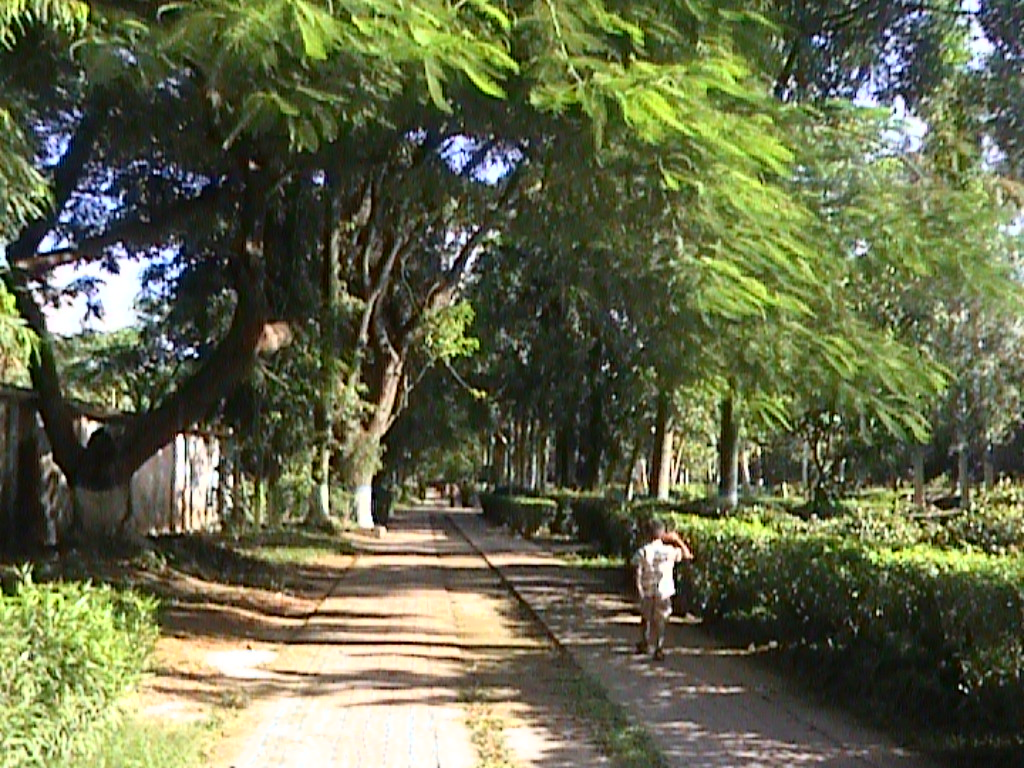 Rajsahi Park, Rajsahi.